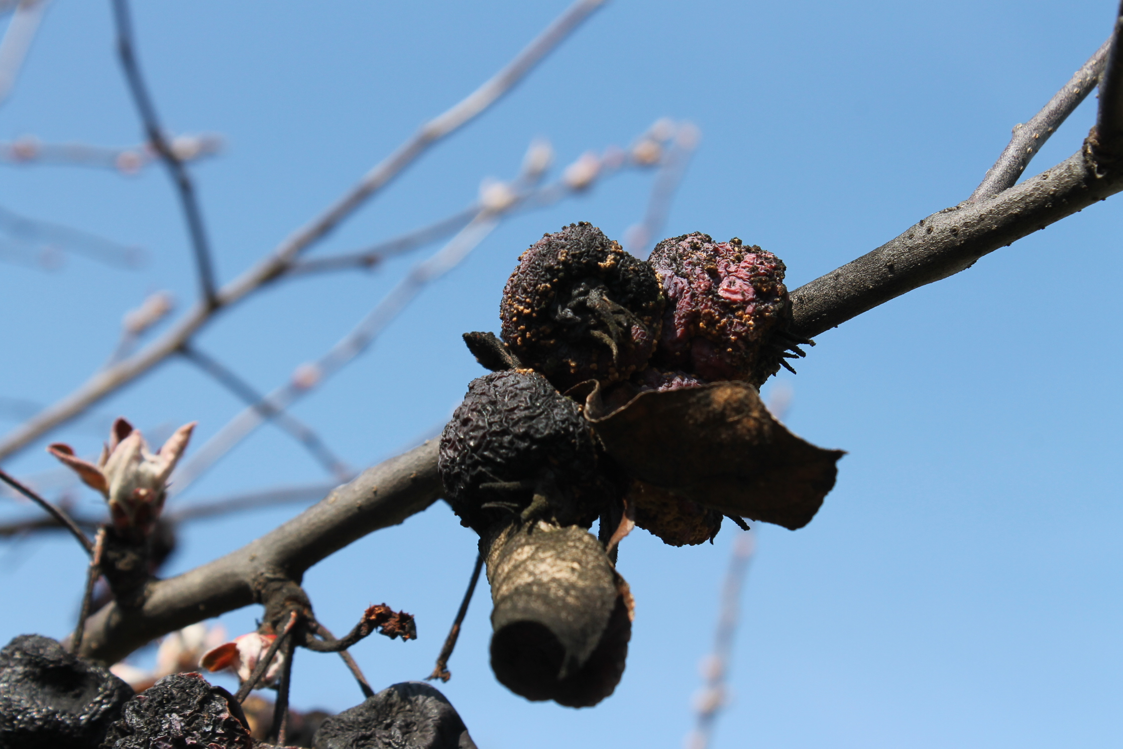 monilióza, jabloň, mumifikovaný plod